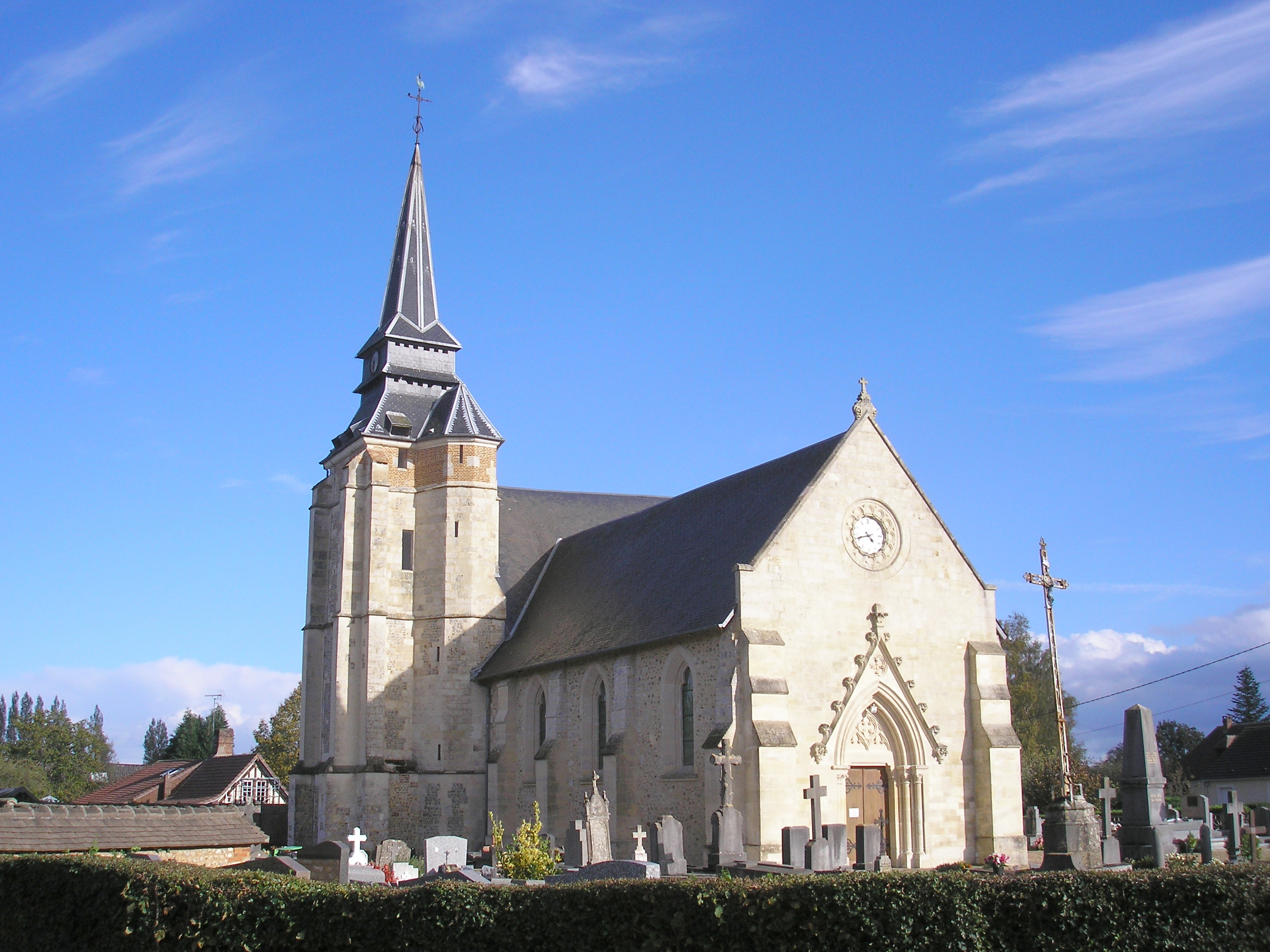 Saint-Philbert-des-Champs (Normandie, France). L'église Saint-Philibert.